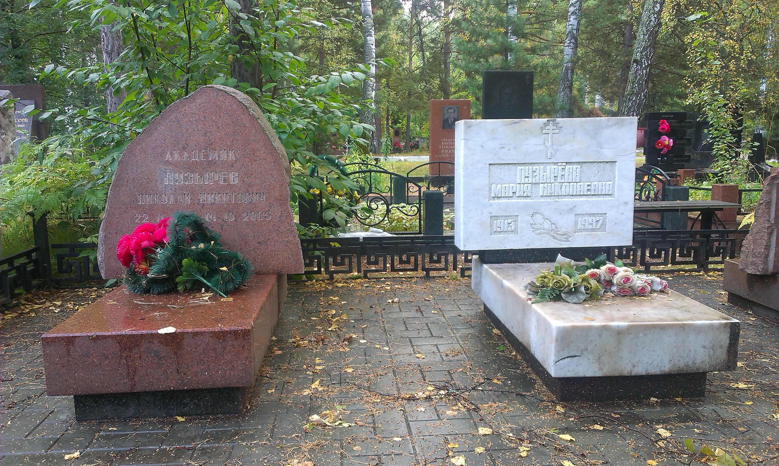 Южное (Чербузинское) кладбище